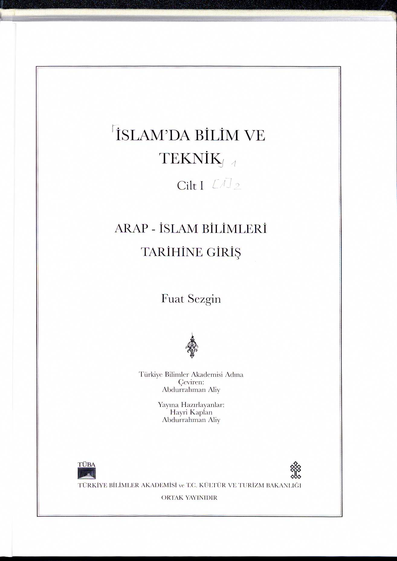 Fuat Sezgin İslam'da bilim ve teknik. 1. Arap-İslam bilimleri tarihine giriş 2007